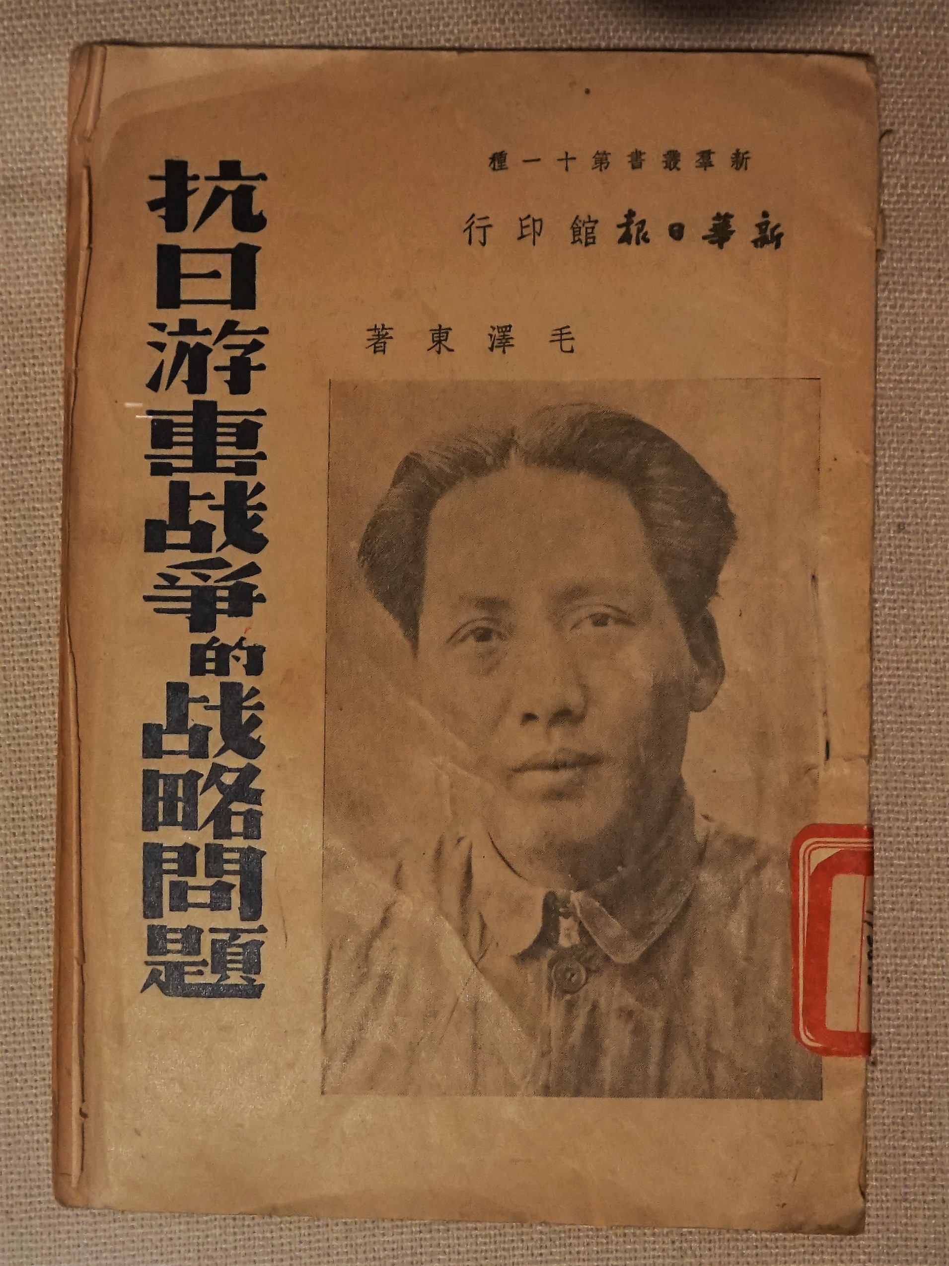 中文（中国大陆）: 1938年6月新华日报馆出版的毛泽东著《抗日游击战争的战略问题》